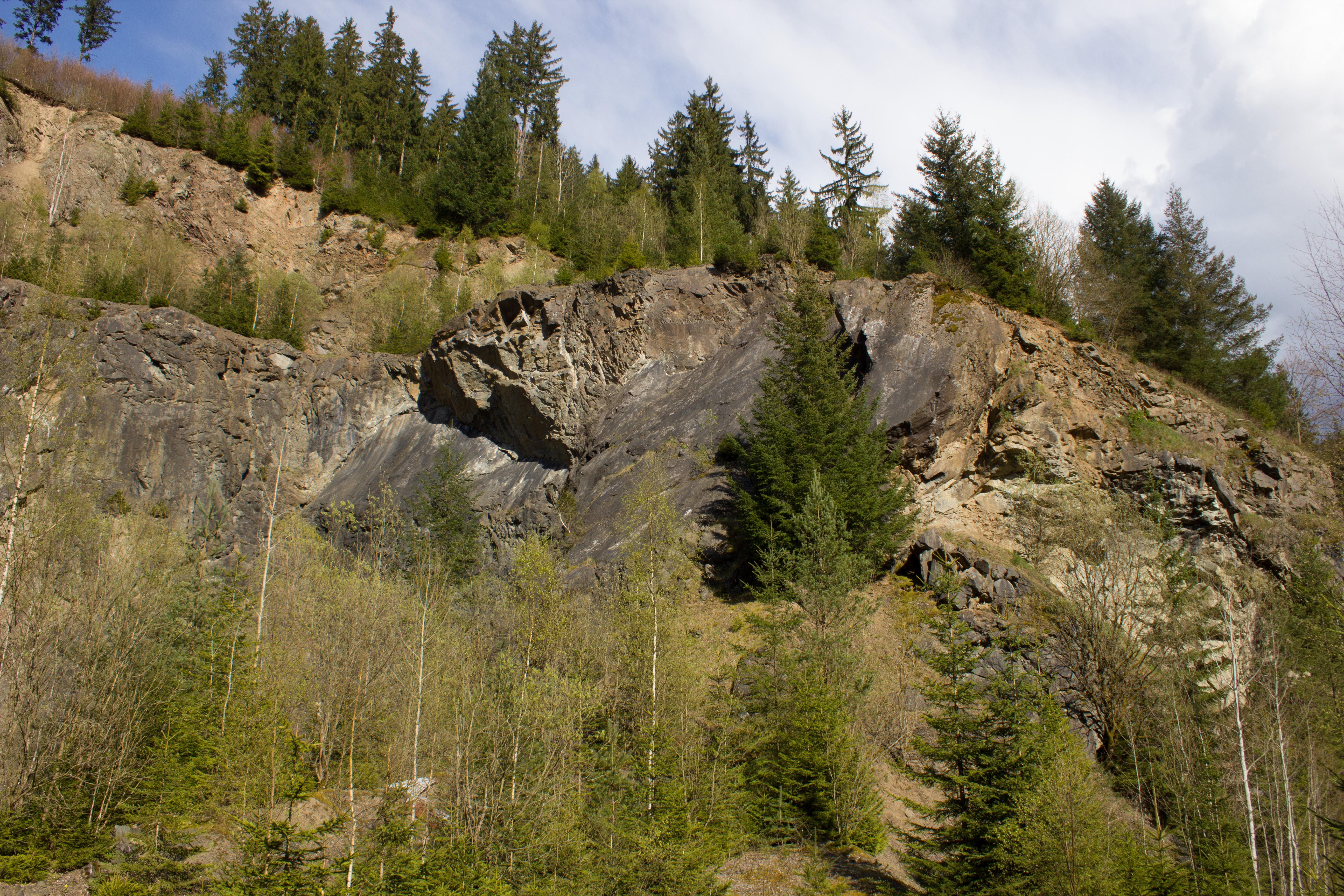 Diabasbruch nordwestlich von Schübelhammer Schwarzenbach am Wald, Geotop 475A002